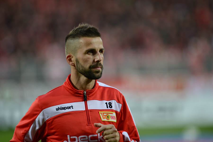 Benjamin Köhler beim Aufwärmen